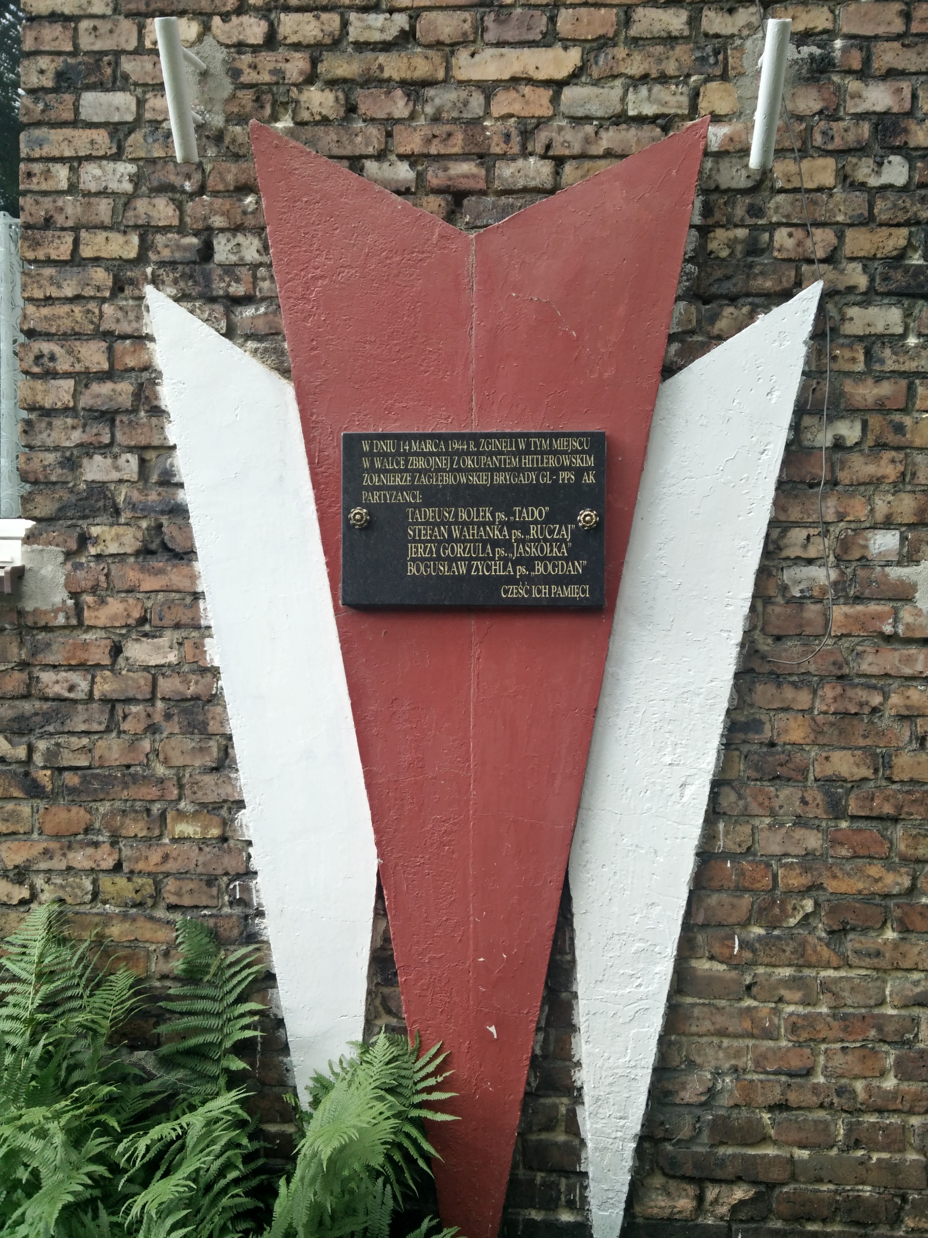 sosnowiec tablica na pogoni